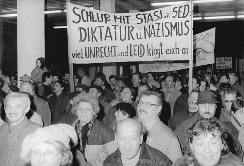 Berlin, Stürmung Stasi-Zentrale ADN-ZB Uhlemann 16.1.90 Berlin: Stürmung AfNS-Zentrale- Auf einer Demonstration vor dem Gebäude des ehemaligen AfNS in der Normannen- und Ruschestraße, zu der das Neue Forum aufgerufen hatte, forderten Tausende die vollständige Auflösung des Amtes und alles dafür zu tun, daß ein solcher Bespitzelungsapparat als Machtinstrument einer Partei nie wieder entsteht. Information added by Wikimedia users.Transparentaufschrift: SCHLUẞ MIT STASI- u. SED- DIKTATUR u. -NAZISMUS viel UNRECHT und LEID klagt euch an